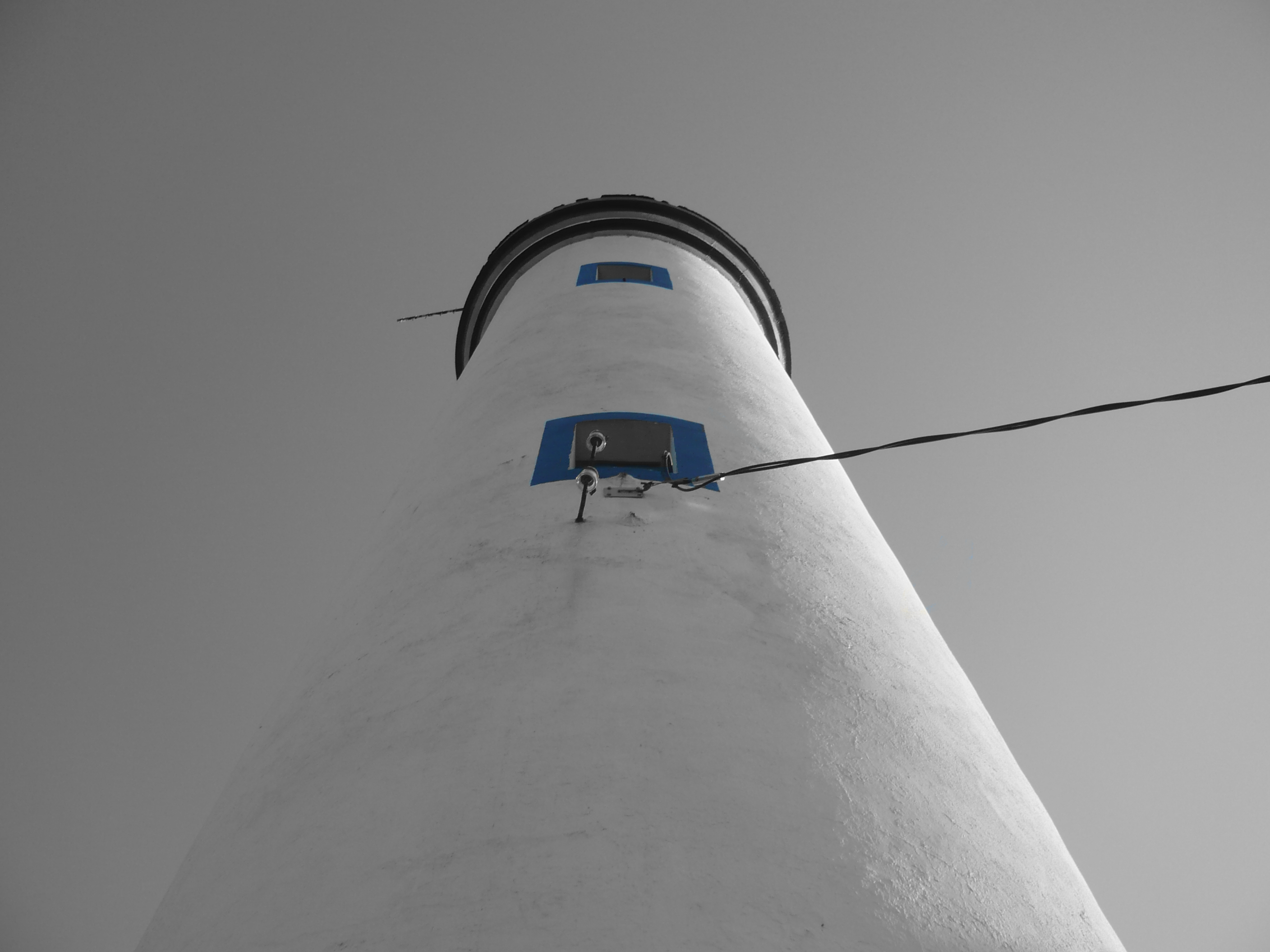 Fotografía del faro de Punta Subrido e color sobre blanco y negro